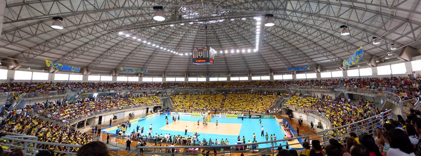 Panorâmica da Arena Multiuso Tancredo Neves em Uberlândia, durante amistoso da Seleção Brasileira de Volei contra os EUA, dia 25 de Setembro de 2009.